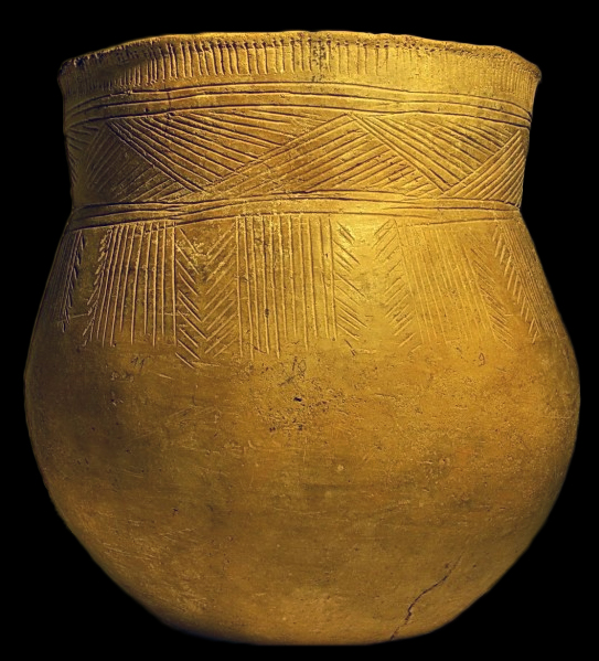 Ходасавічы. Гліняная пасудзіна сярэднедняпроўскай культуры з сімваламі Сусветнага Дрэва. Экспазіцыя «Найстаражытная гісторыя Гомельшчыны»